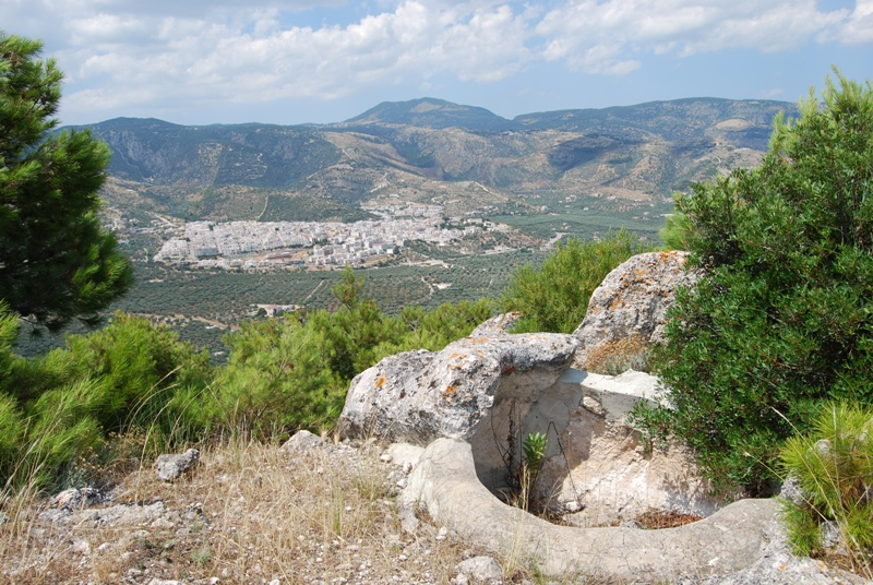 Tombe dei Dauni su Monte Saraceno a Mattinata (fg)